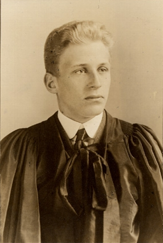 Perreault Casgrain, Quebec politician